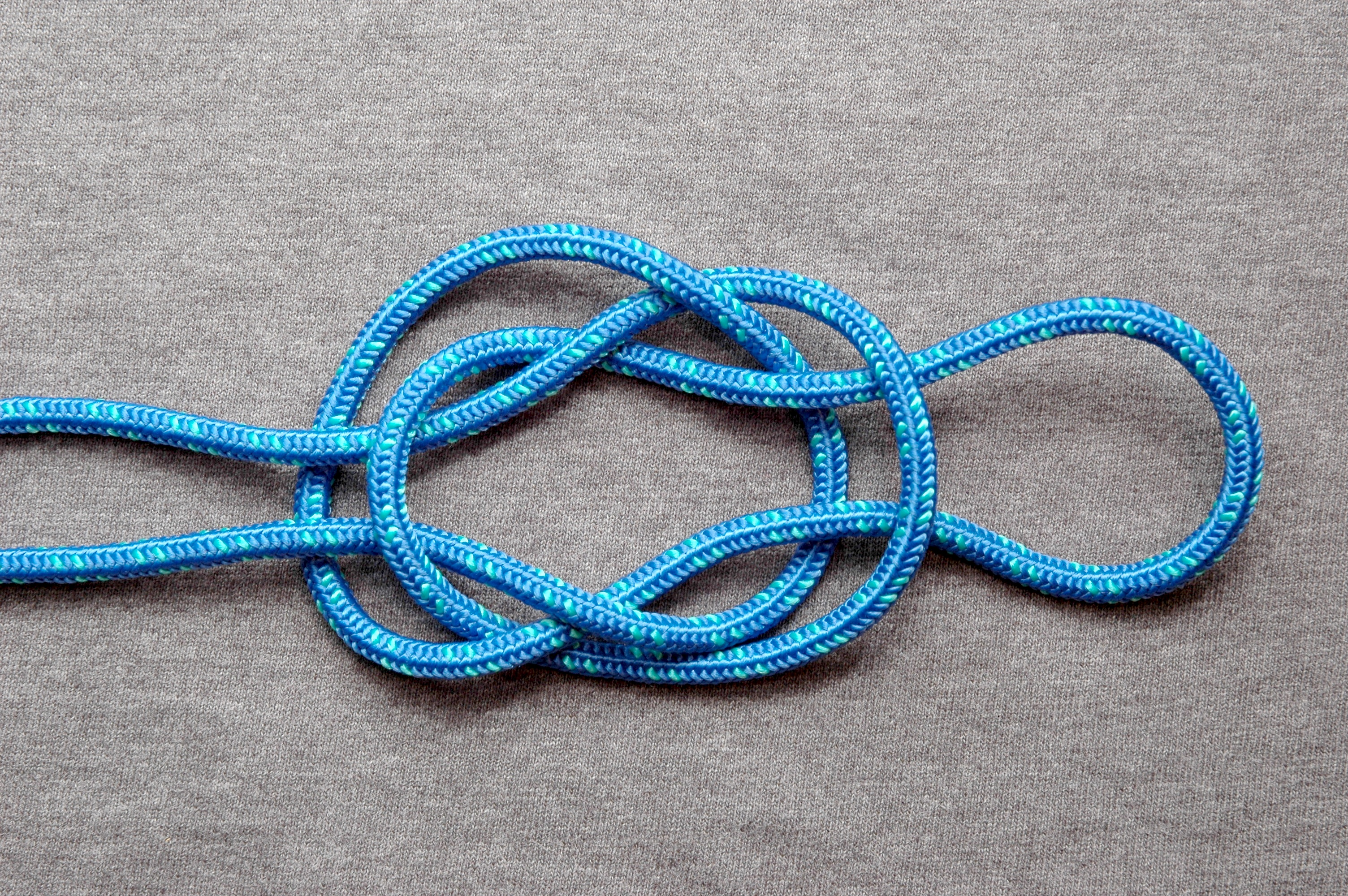 Bottle sling (ABOK #1142), aka Jug Sling.